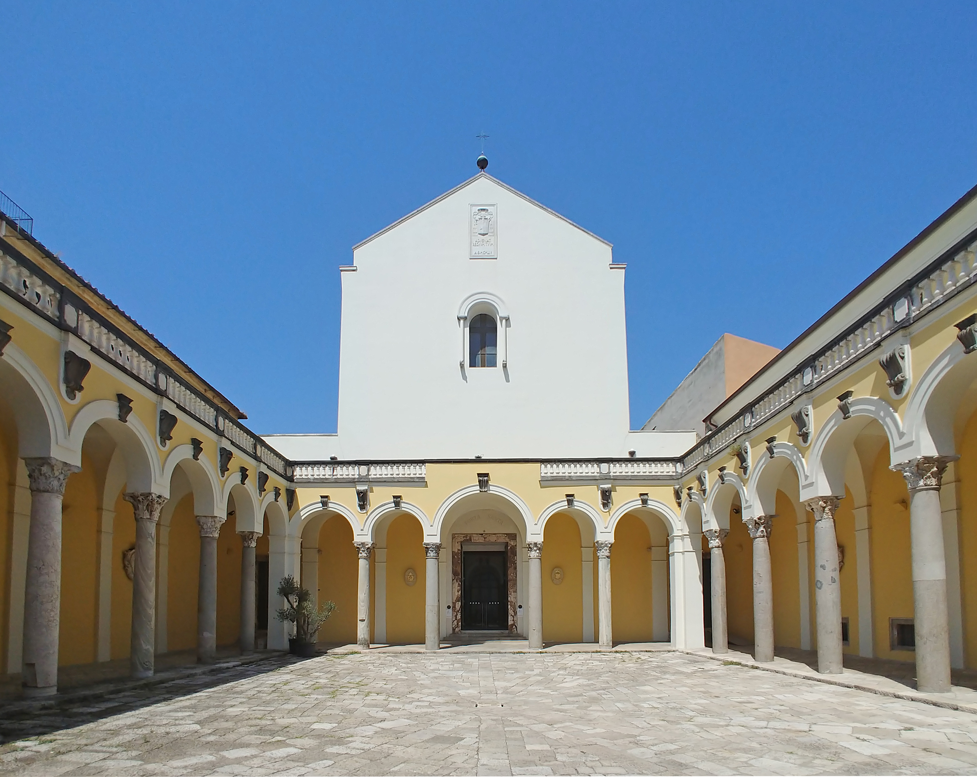 Quadriportico.